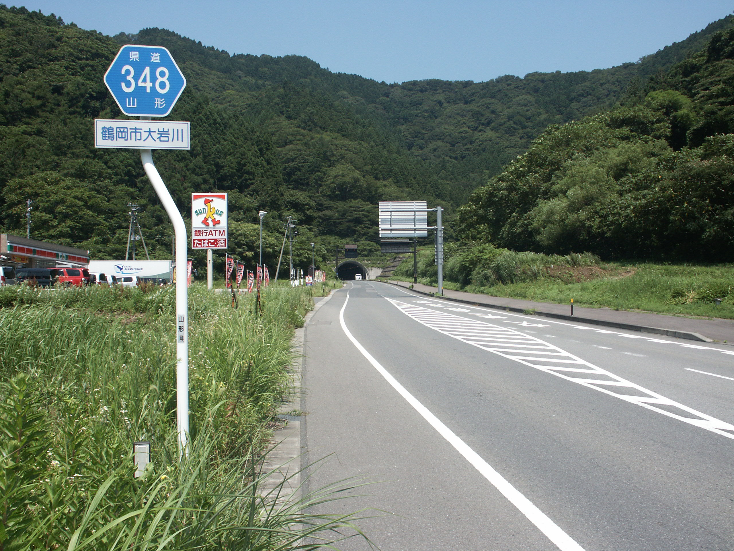 山形県道348号線鶴岡市大岩川付近